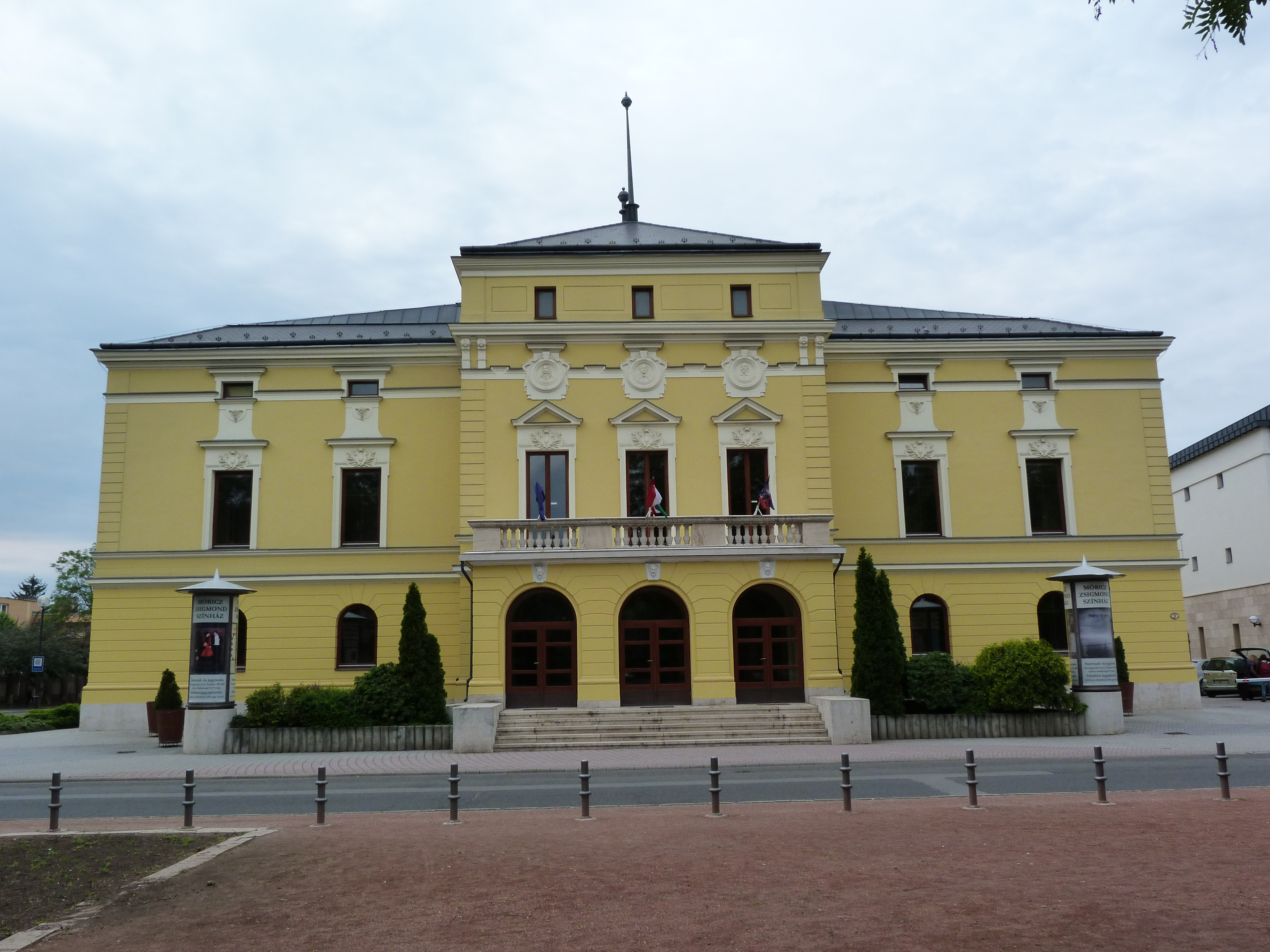 A felvétel 2013. Május 17 –én pénteken készült Nyíregyházán. ©© Derzsi Elekes Andor, Budapest, 2013, A kép és filmfelvételek egészben, vagy részletekben másolását, bármilyen úton történő sokszorosítását és felhasználását a szerző ellenérték nélkül, jogutódjaira is kihatóan megengedi. Az engedély kiterjed a kereskedelmi célú hasznosításra is. Kéri azonban nevének feltüntetését a felhasználás során. A Metapolisz sorozat valamennyi képe és filmje Creative Commons alatti valamint kereskedelmi - for profit - célra is felhasználható. Ajánlott hivatkozás: Derzsi Elekes Andor: Metapolisz DVD line